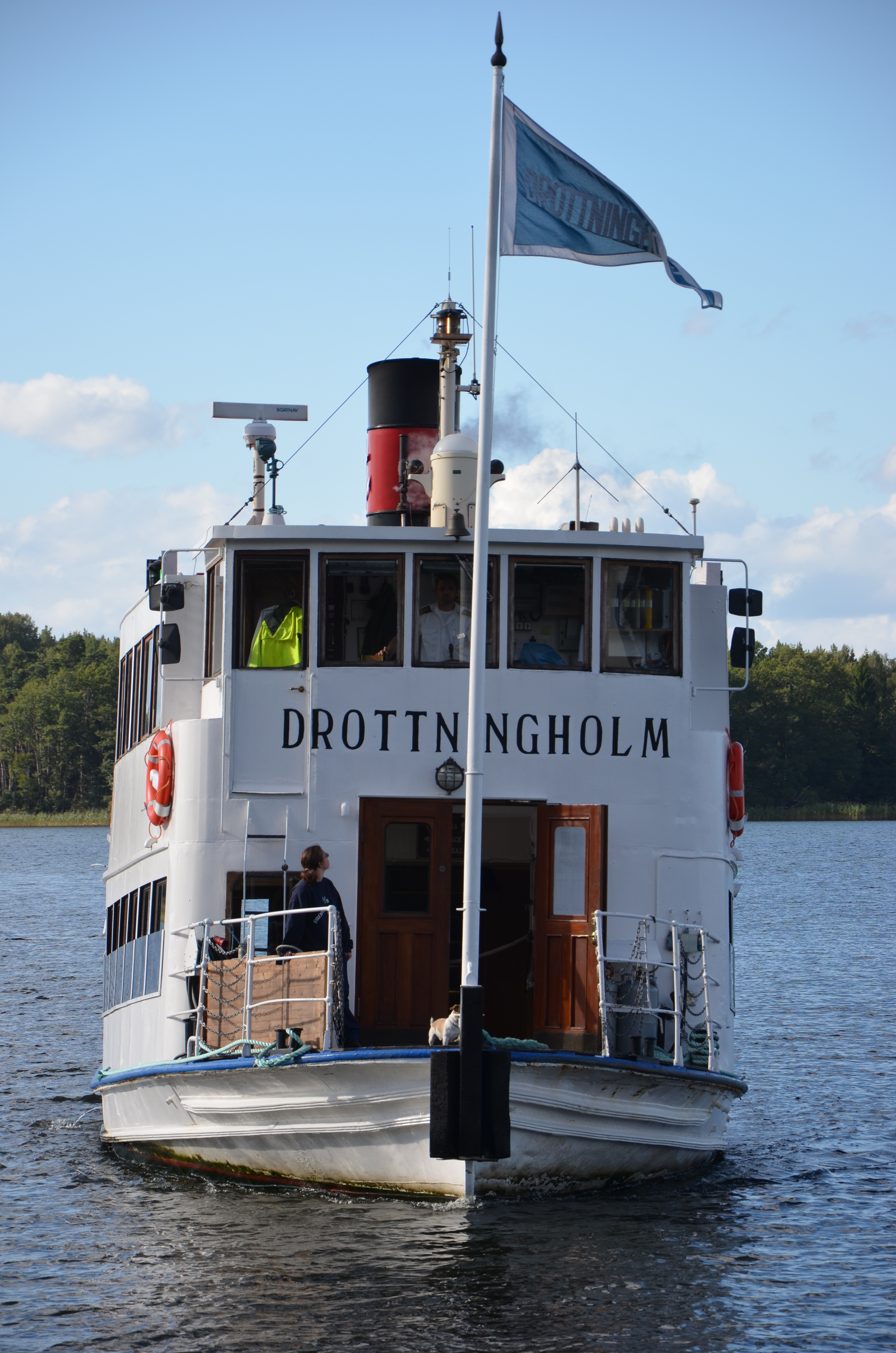 S/S Drottningholm på våg mot Frodhemsbryggan This is an image of the protected Swedish ship S/S Drottningholm, with call sign SHCO .